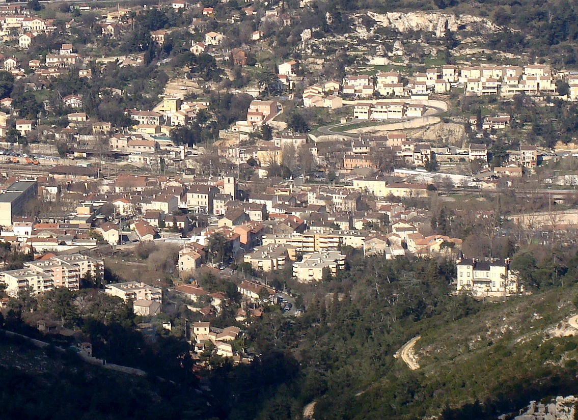 Vue d'ensemble du quartier de Saint-Marcel, à Marseille (11e arr.), depuis le rocher de la Vigie (massif de Saint-Cyr) (vue au téléobjectif=